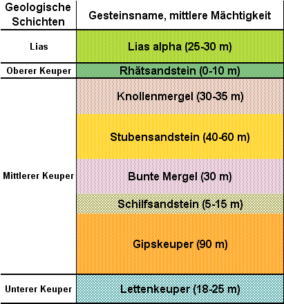 Schönbuch, geologische Schichtung